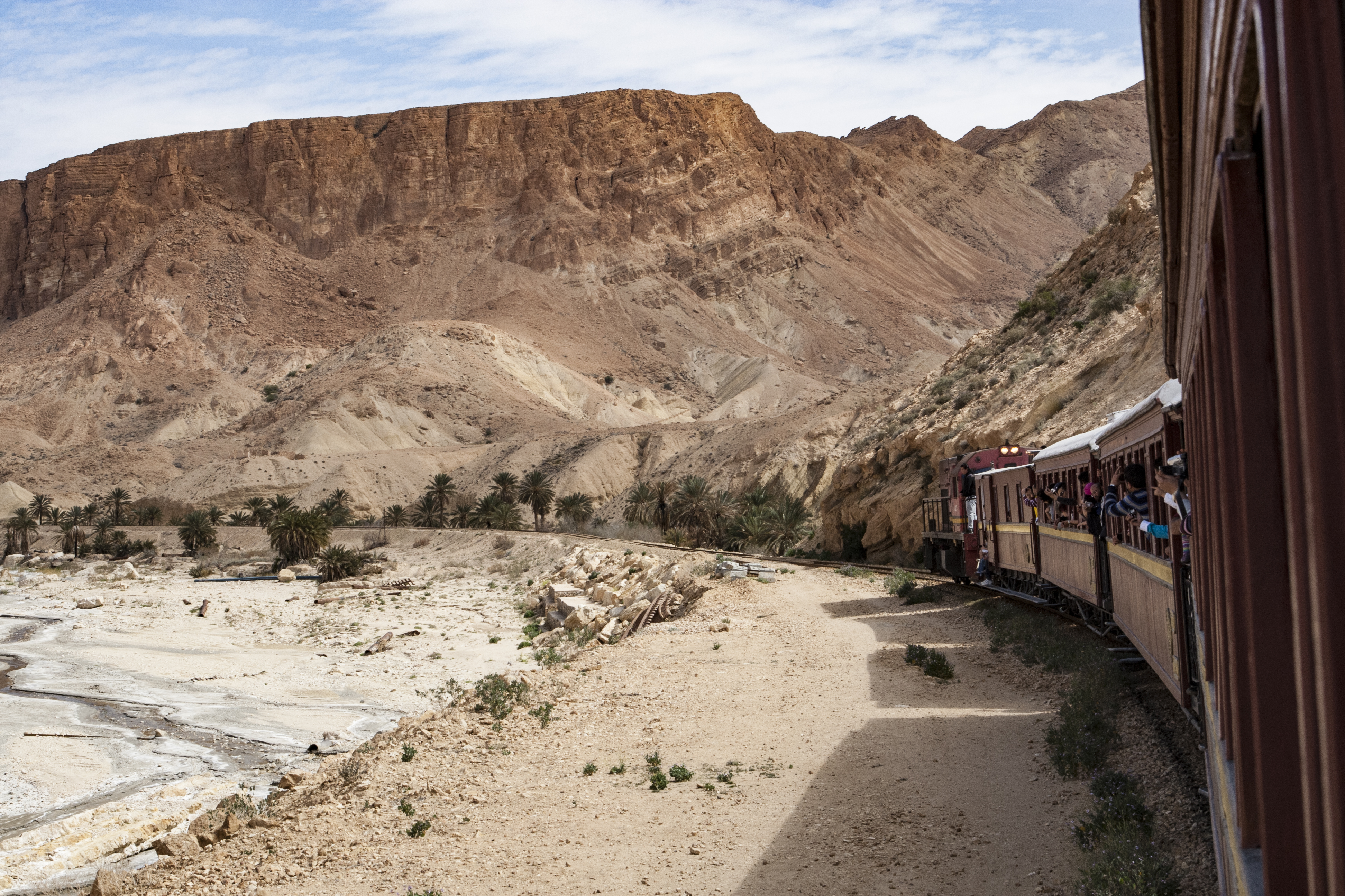 Wąwóz Seldża. Widoki z pociągu "Czerwona Jaszczurka"